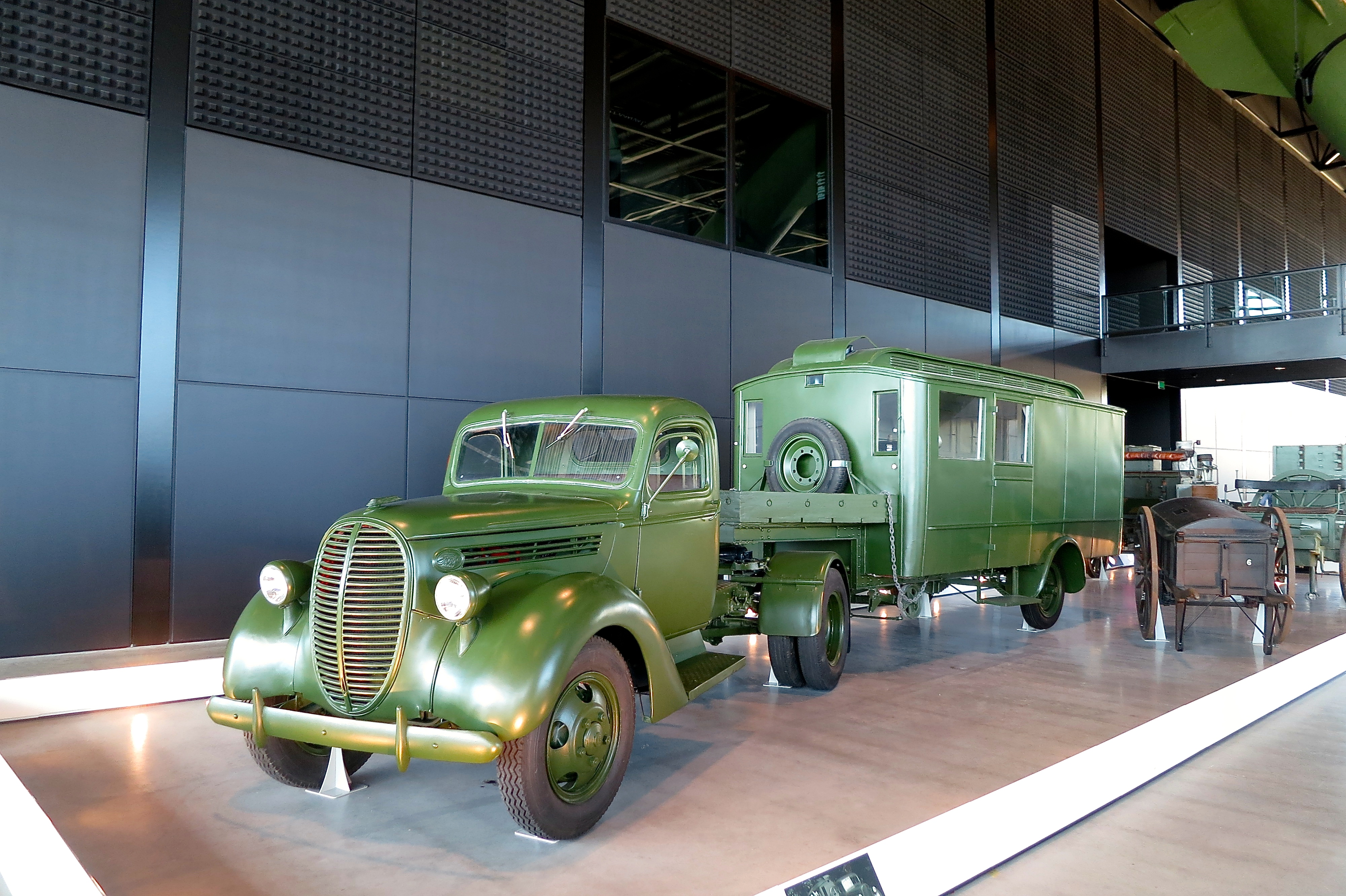 Tijdens de mobilisatie van 1939-1940 worden civiele vrachtauto's gevorderd en groen geverfd. Deze Ford trekt een keukenoplegger met daarin 2 fornuizen, ieder voorzien van een kookpot van circa 115 liter. During the mobilization of 1939-1940 the army requistioned civilian trucks which were then painted green. This Ford V8 pulled a kitchen trailer with 2 stoves each containing a 115 litres cooking pot. Nationaal Militair Museum. The Dutch National Military Museum is situated on the former air base Soesterberg.